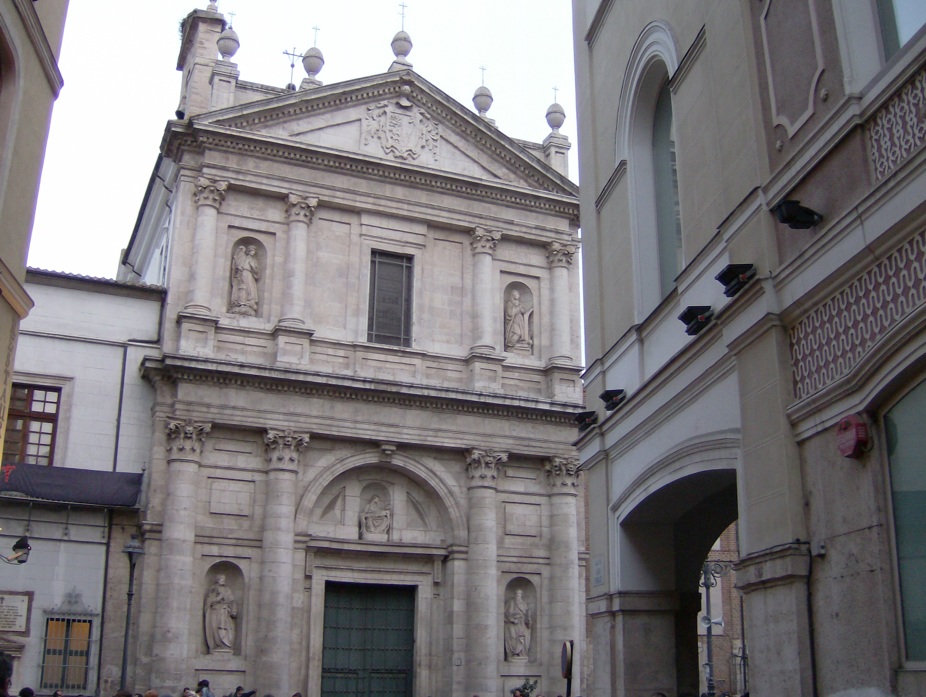 Iglesia de Nrta. Señora de las Angustias.